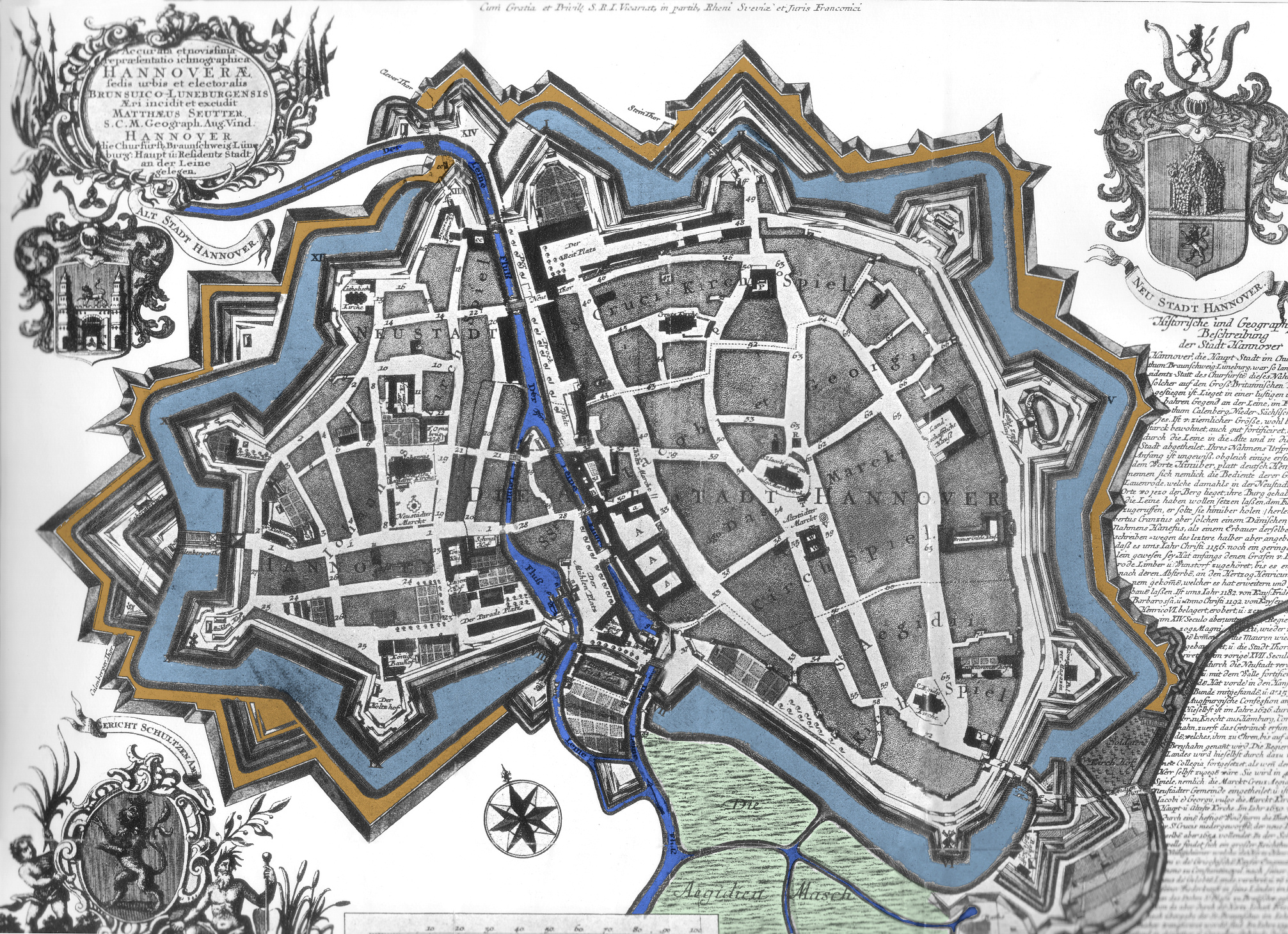 Hannover 1745, nachträglich koloriert durch AxelHH